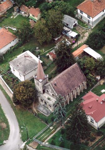 Rudabánya, Hungary, aerialphotography